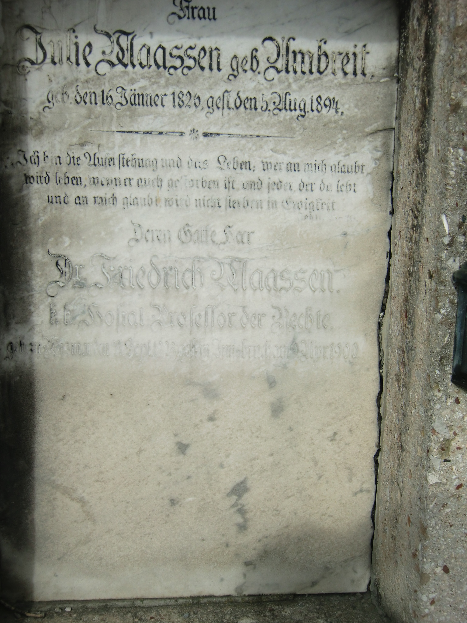 Professor Dr. Friedrich Maassen Grabstätte